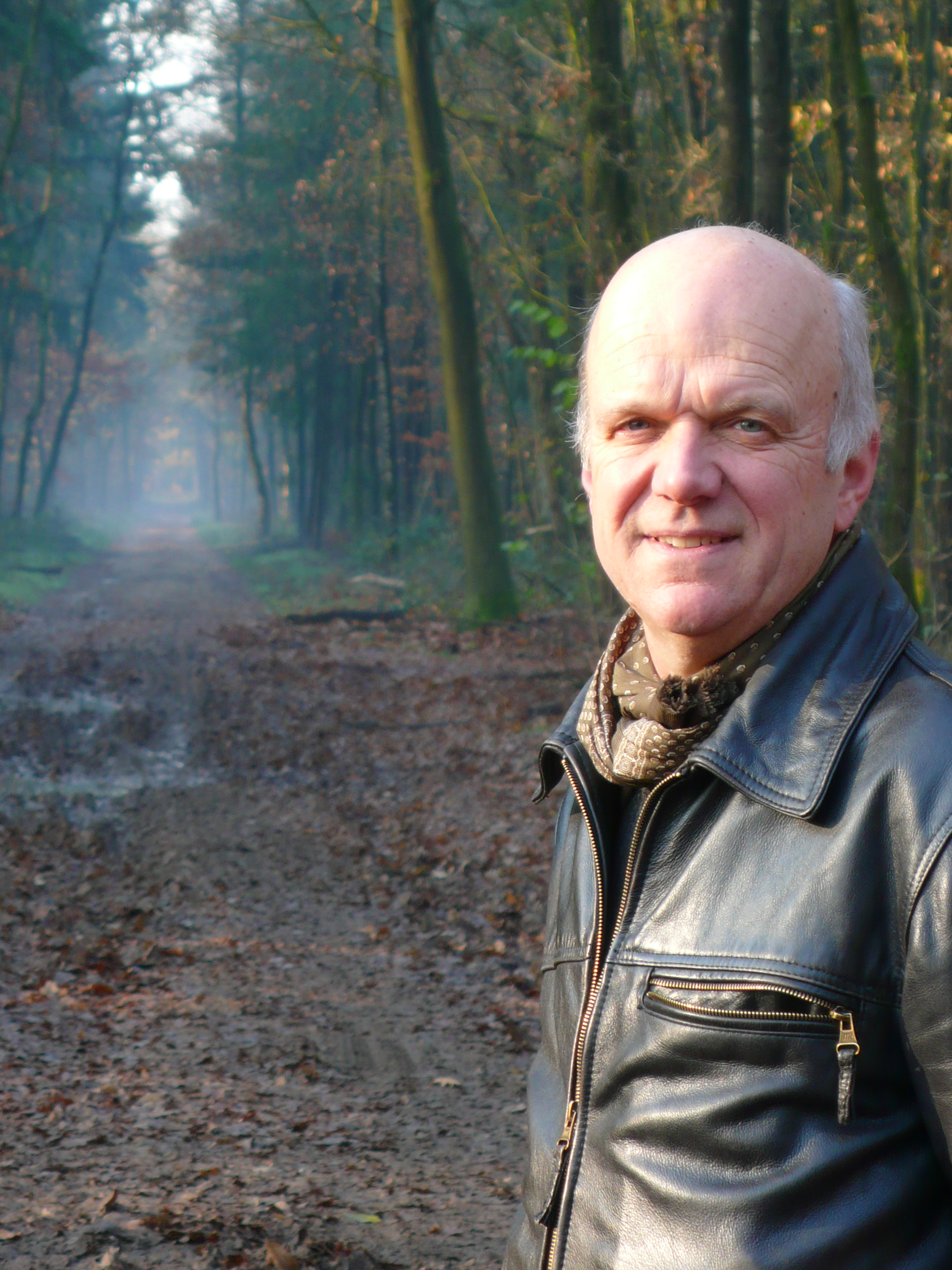 J.M.B. (Jan) Cremers (Limbricht, 3 mei 1952) is een Nederlandse socioloog en voormalig politicus namens de Partij van de Arbeid (PvdA).